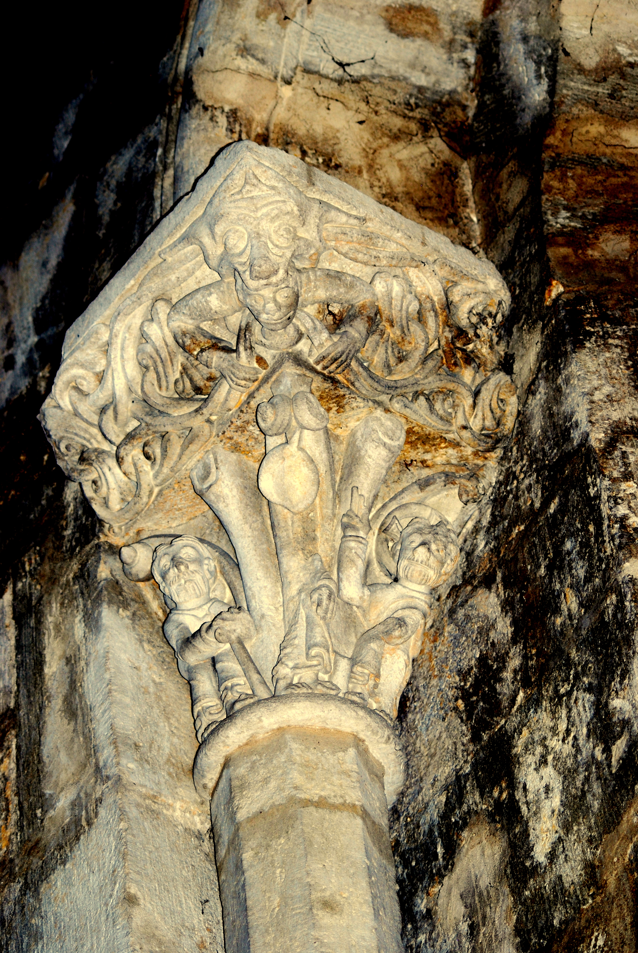 Chapiteaux de l'abbaye de Saint-Ferme